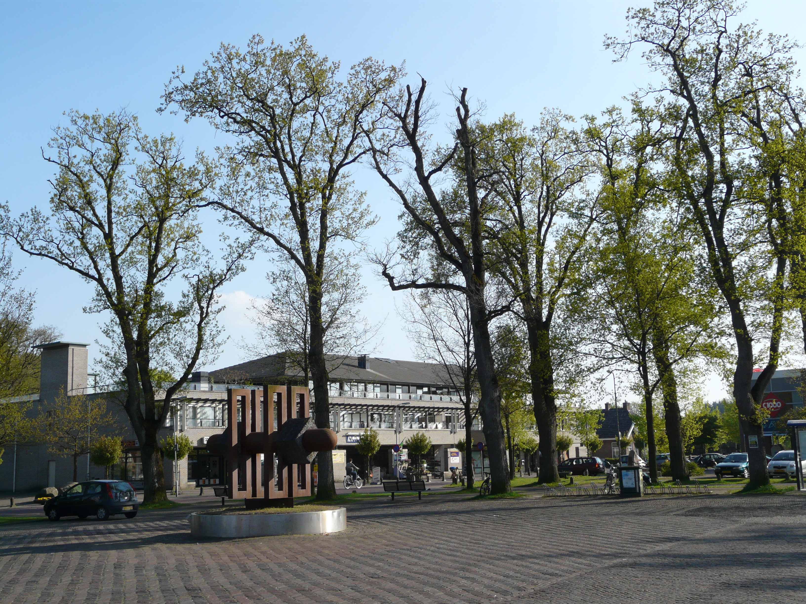 Piet Soerplein in Havelte